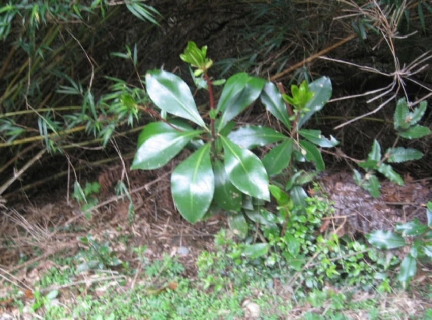 Plántula de canelo (Drimys winteri), parque Oncol, Valdivia, Chile